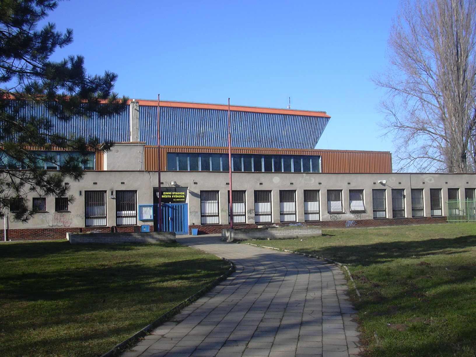 Zimní stadion (Vyškov- czech republic)